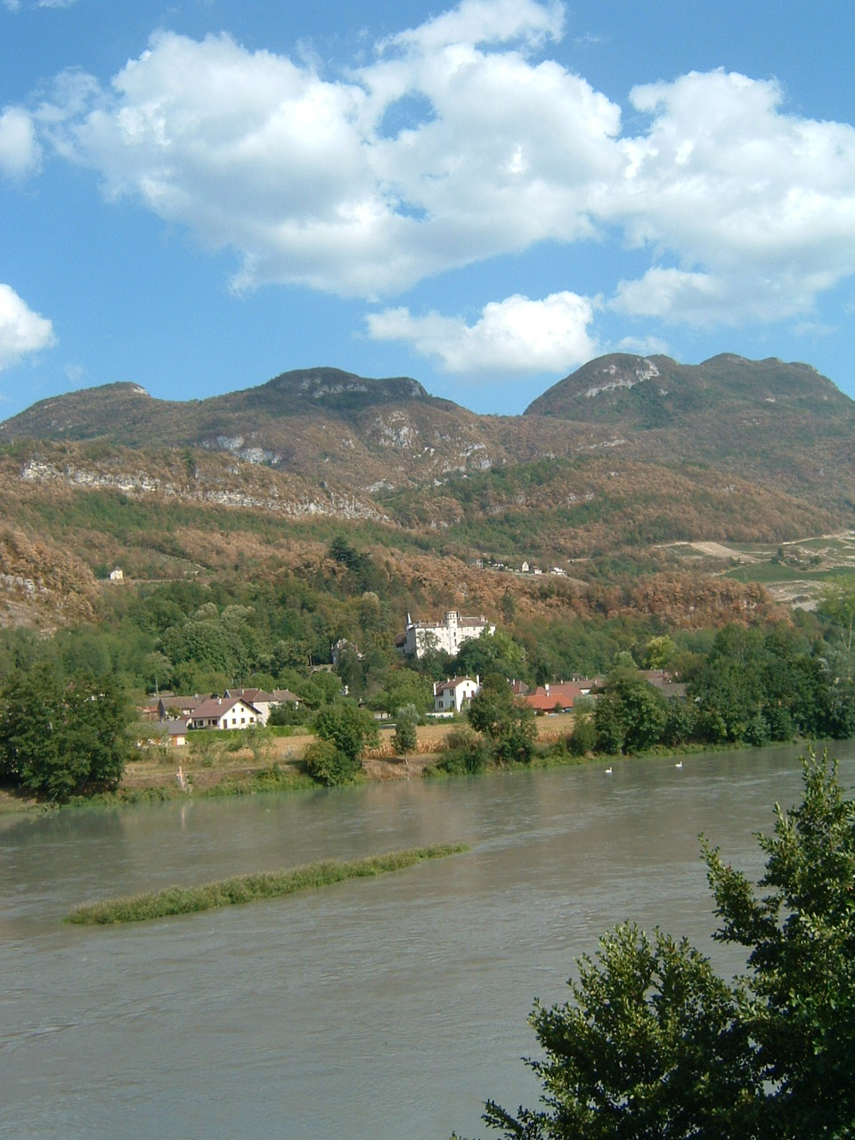 Château de Lucey